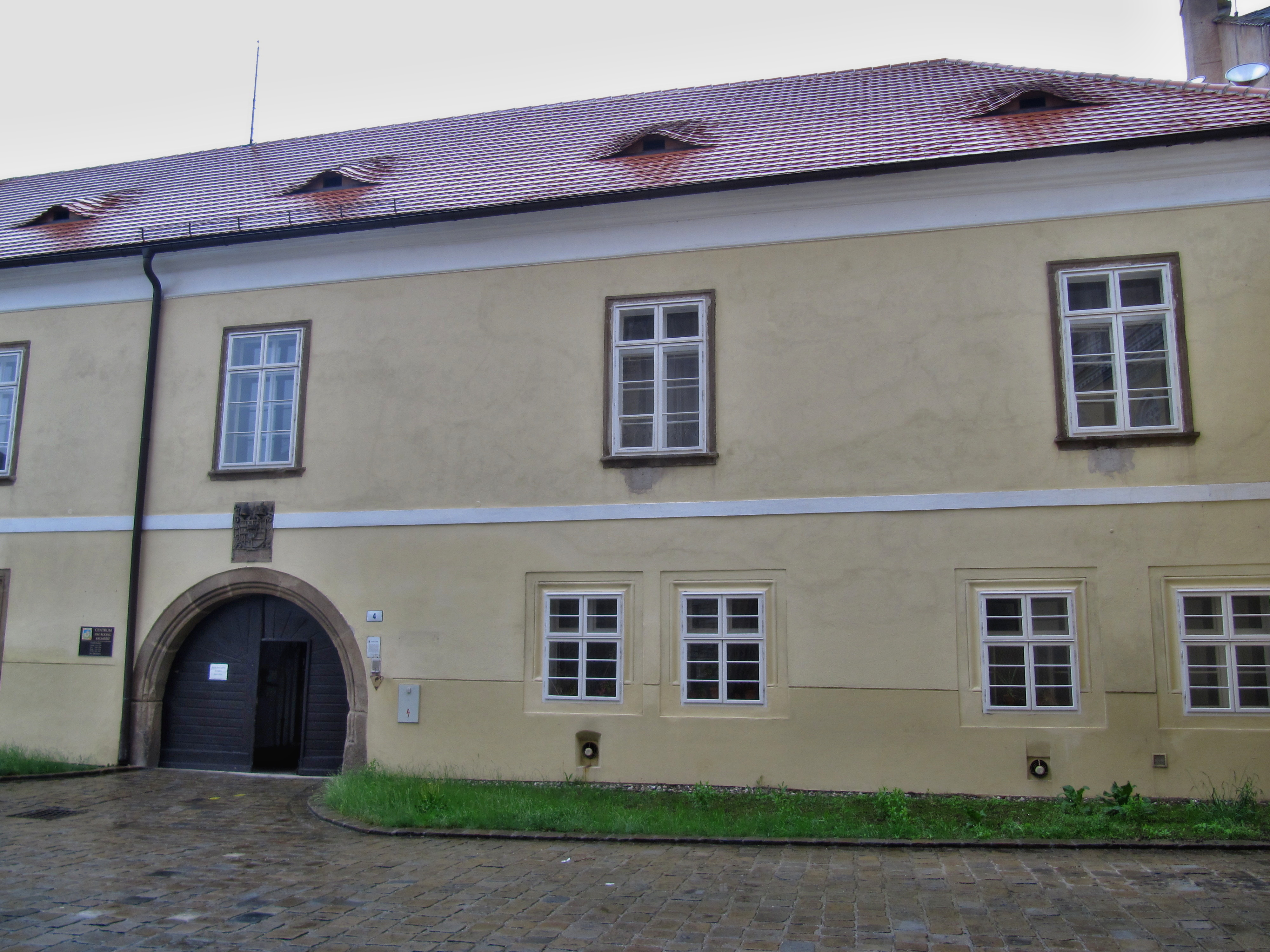 Fara (Kroměříž), Stojanovo nám. 4/5, Kroměříž